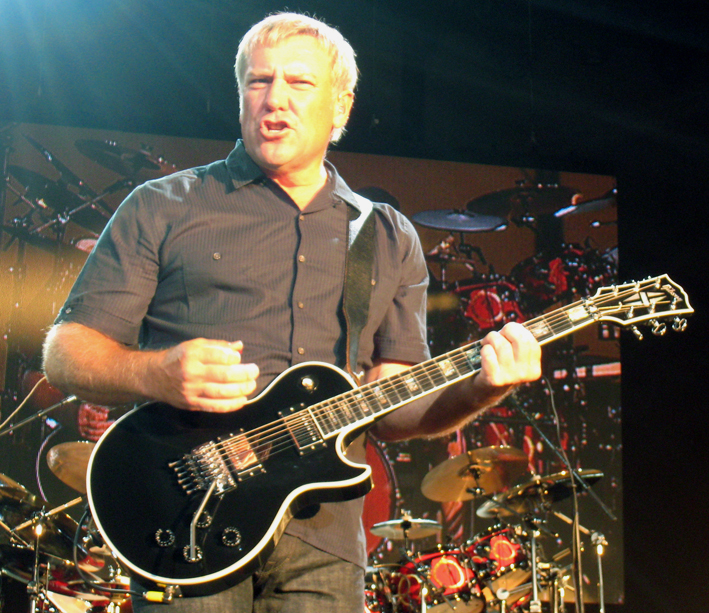 Alex Lifeson